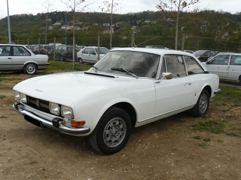 Mantes la Jolie 2012